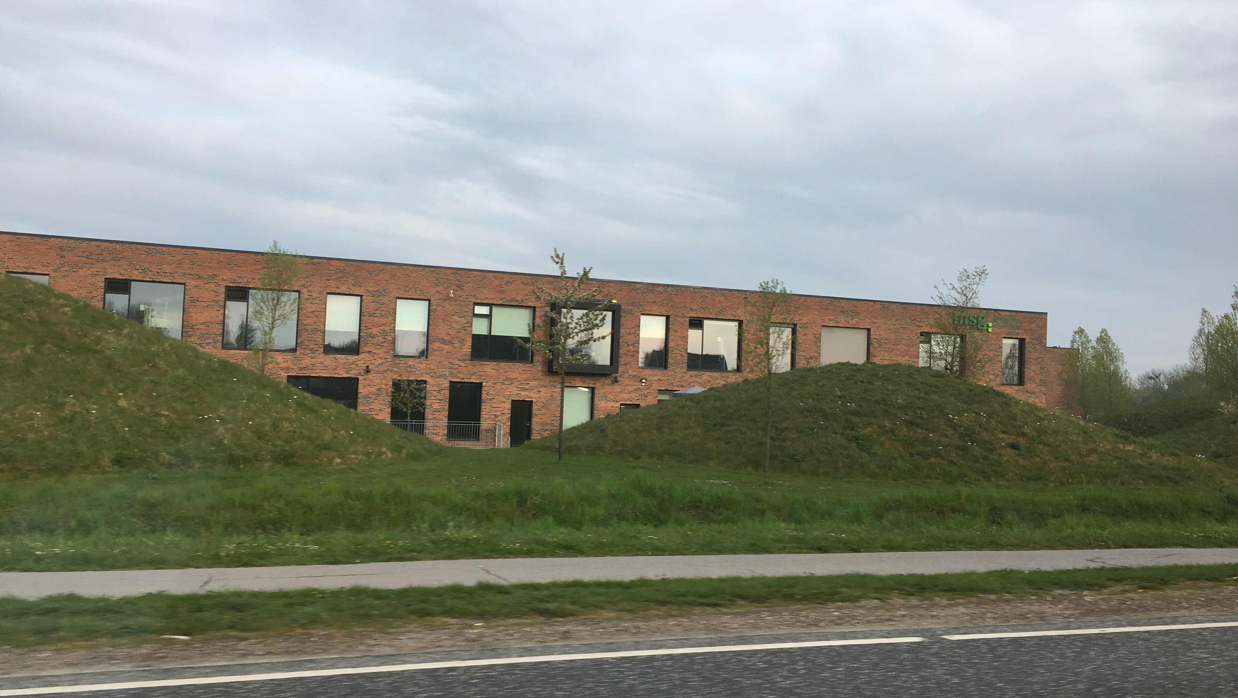 Midtsjællands Gymnasium, Ringsted